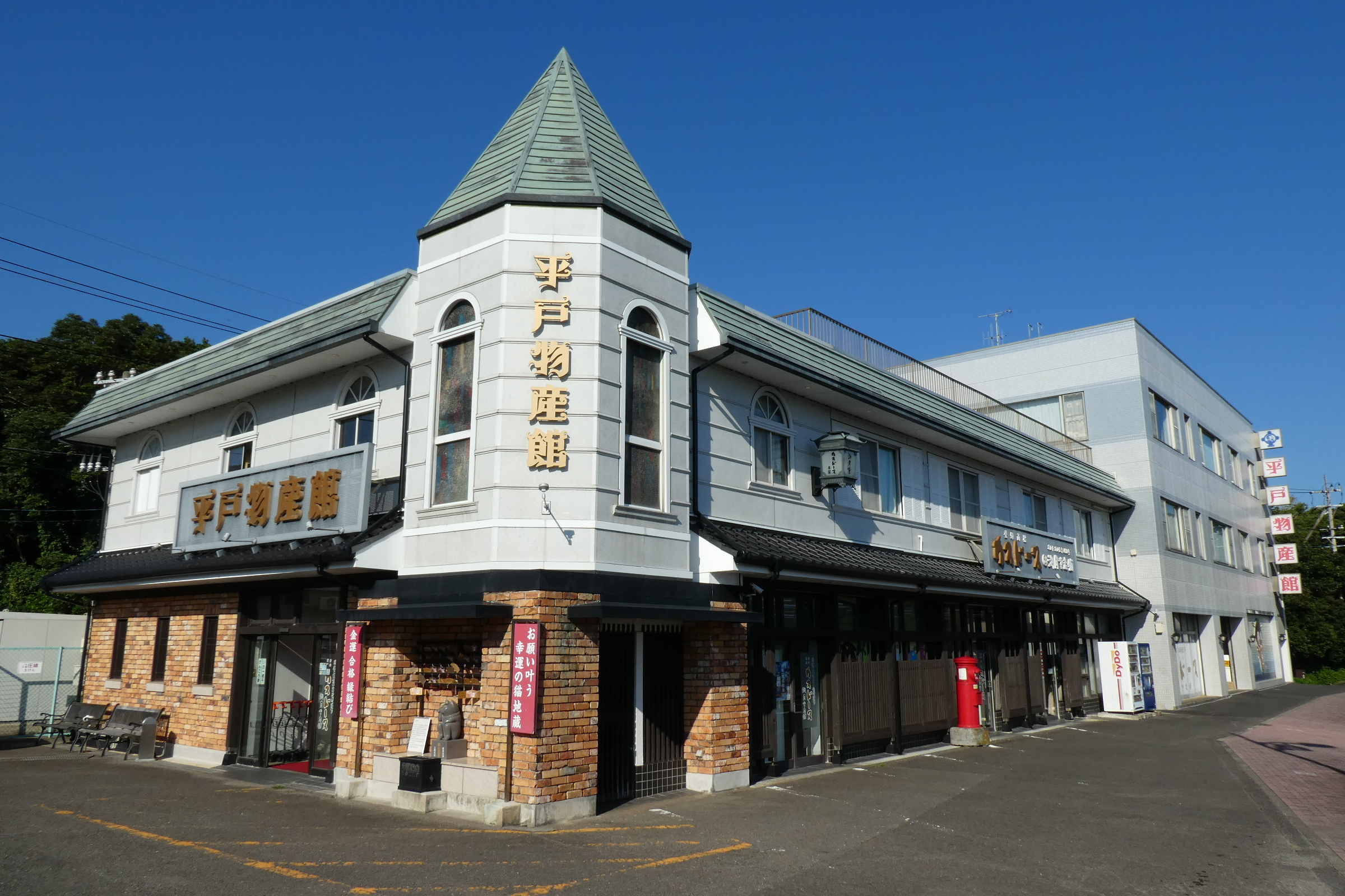 長崎県平戸市 平戸物産館。